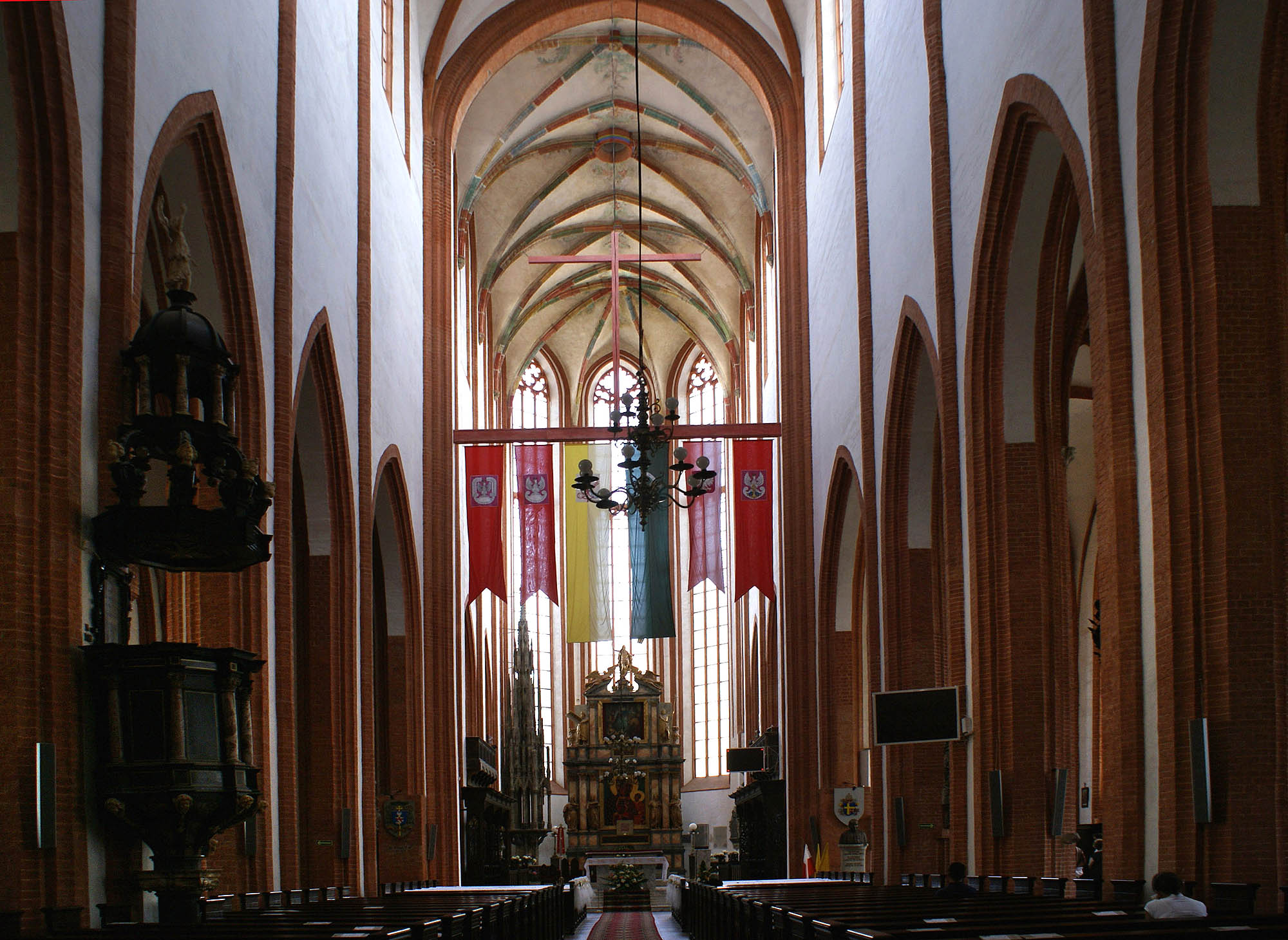 Wrocław, kościół par., ob. garnizonowy p.w. św. Elżbiety, 1 ćw. XIV, 1486